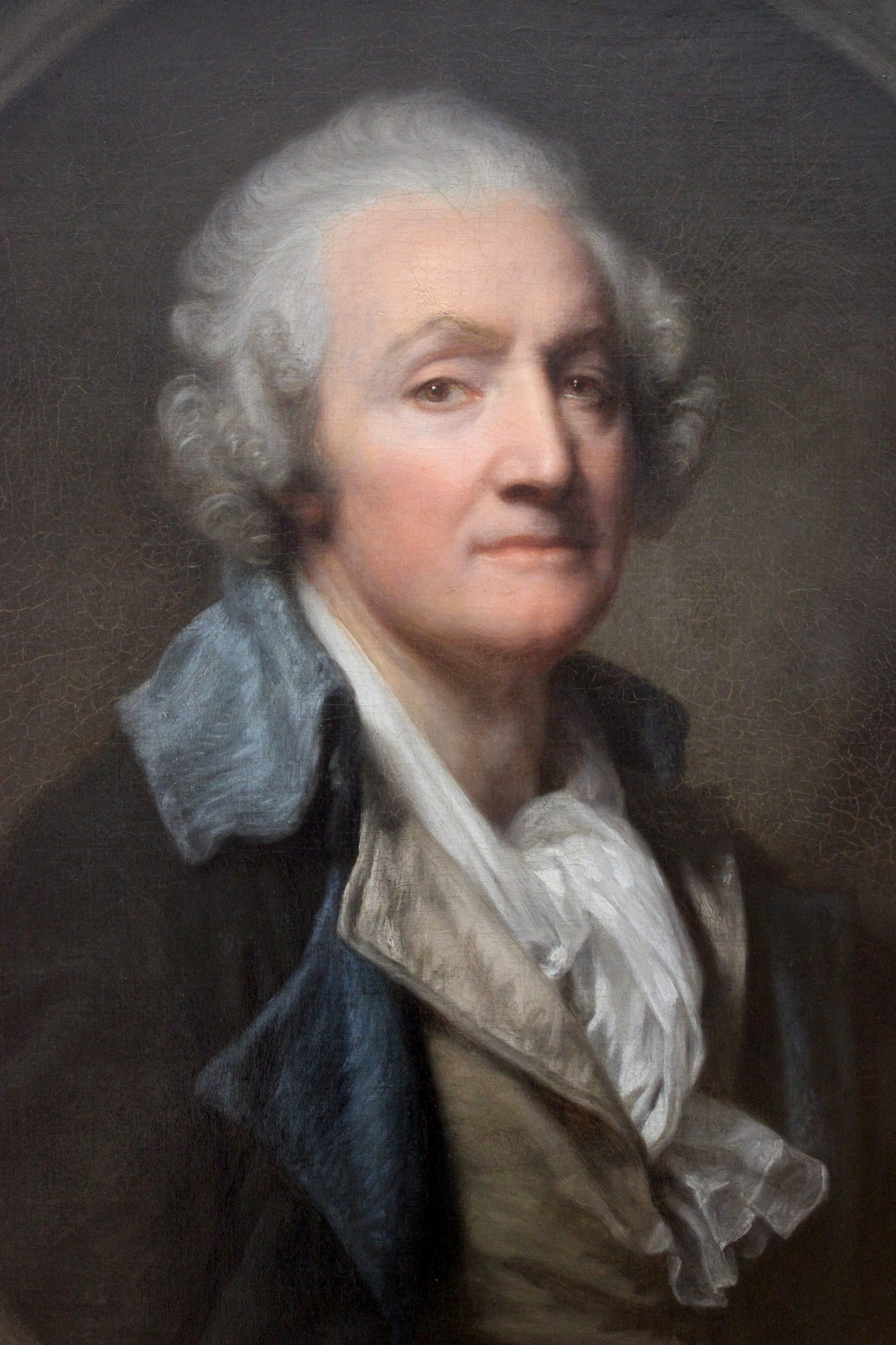 París, Louvre. Autorretrato de Greuze.